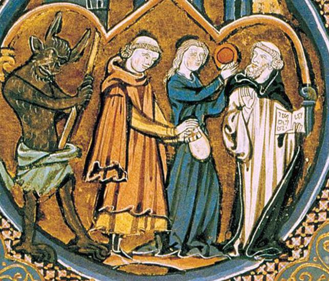 Een demoon die zijn lust kenbaar maakt in een manuscript uit de 13de eeuw.